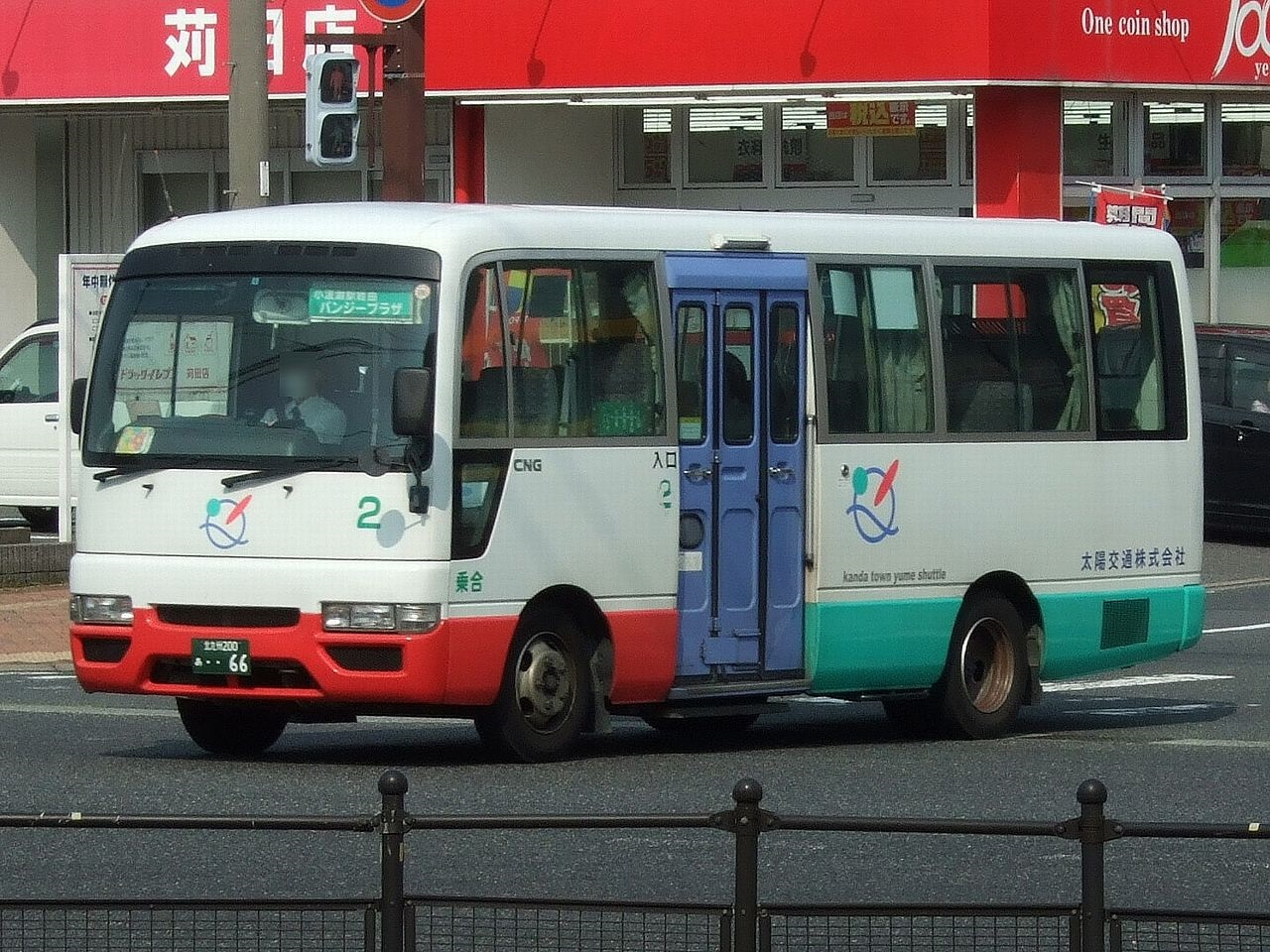 "Yume Shuttle", Kanda Town community bus. 苅田町コミュニティバス「ゆめシャトル」